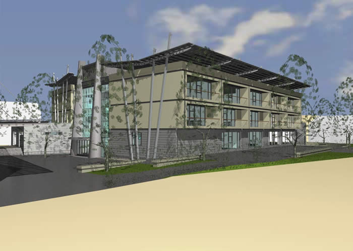 Le nouveau bâtiment n’est pas une annexe ni une excroissance, elle est l’expansion de l’école. Ce n’est pas uniquement 4000 m2 qui s’ajoutent, c’est une capacité d’accueillir qui grandit, c’est une volonté de mener à l’emploi qui sera plus efficace, c’est un cadre pour former des citoyens adultes et responsables qui prend forme.